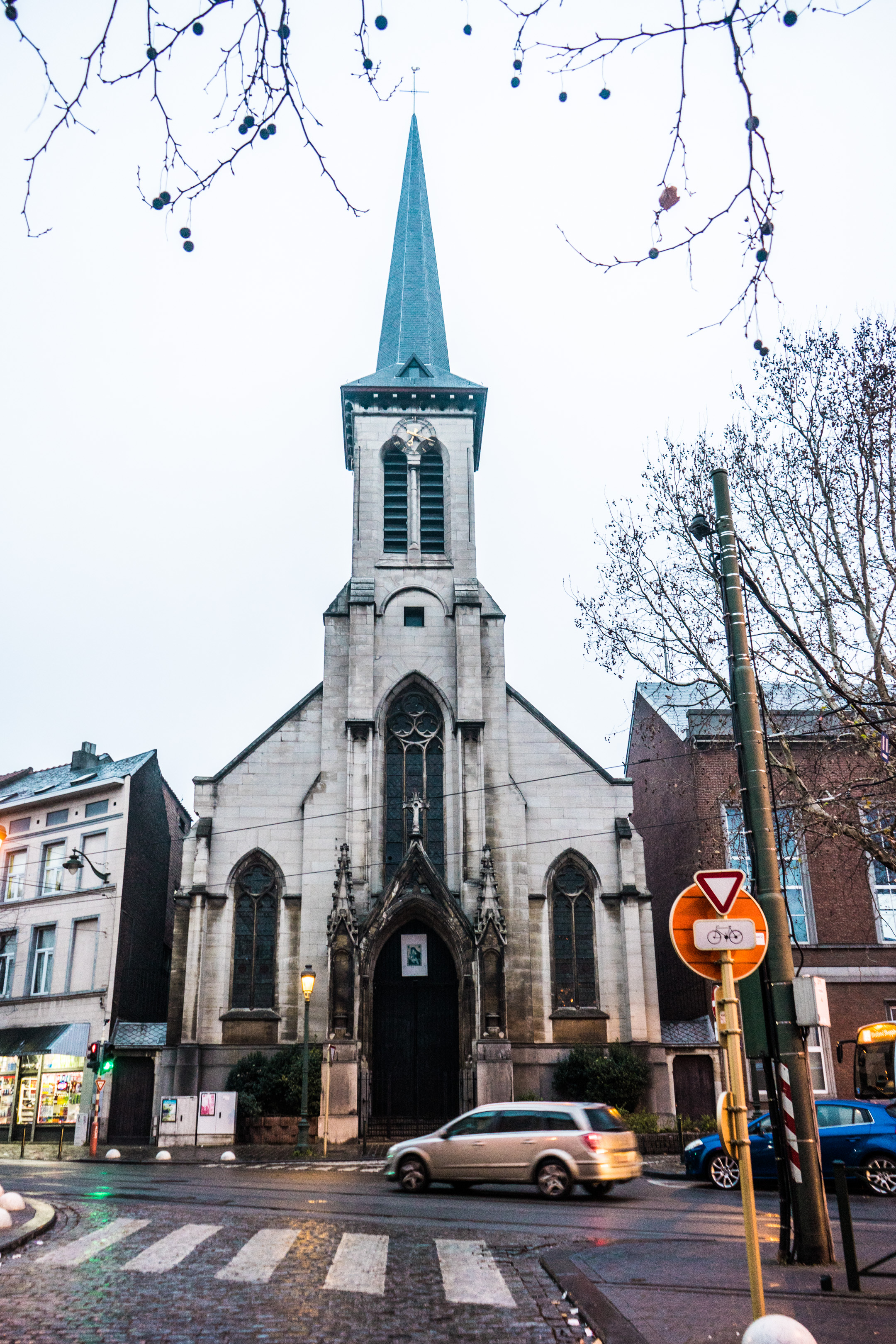 Eglise Sainte Barbe de Molenbeek.